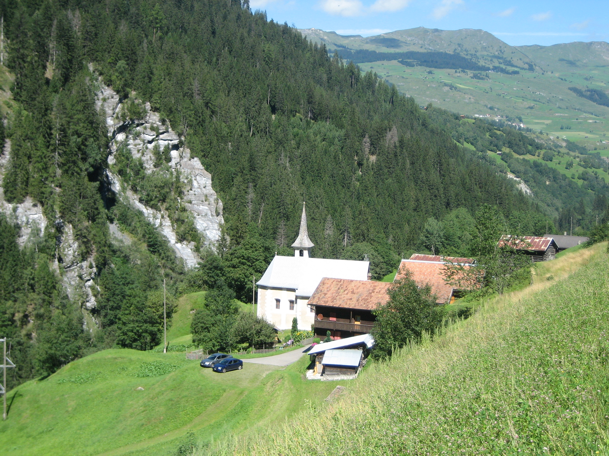 St. Martin im Valsertal